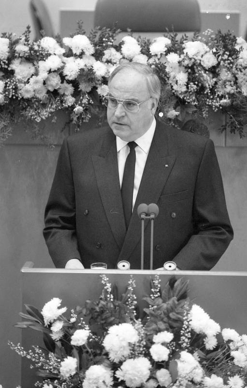 Bonn, 12. Januar 1990 Trauerstaatsakt für den am 31.12.1989 verstorbenen ehemaligen Bundesminister Dr. Gerhard Schröder. In Anwesenheit des Bundespräsidenten, des Präsidenten des Bundesverfassungsgerichts und von Mitgliedern der Bundesregierung, des Bundestages und des Bundesrates würdigten Bundestagspräsidentin Prof. Rita Süssmuth, Bundeskanzler Dr. Helmut Kohl und der frühere Bischof Dr. D. Hermann Kunst das politische Lebenswerk des Verstorbenen.